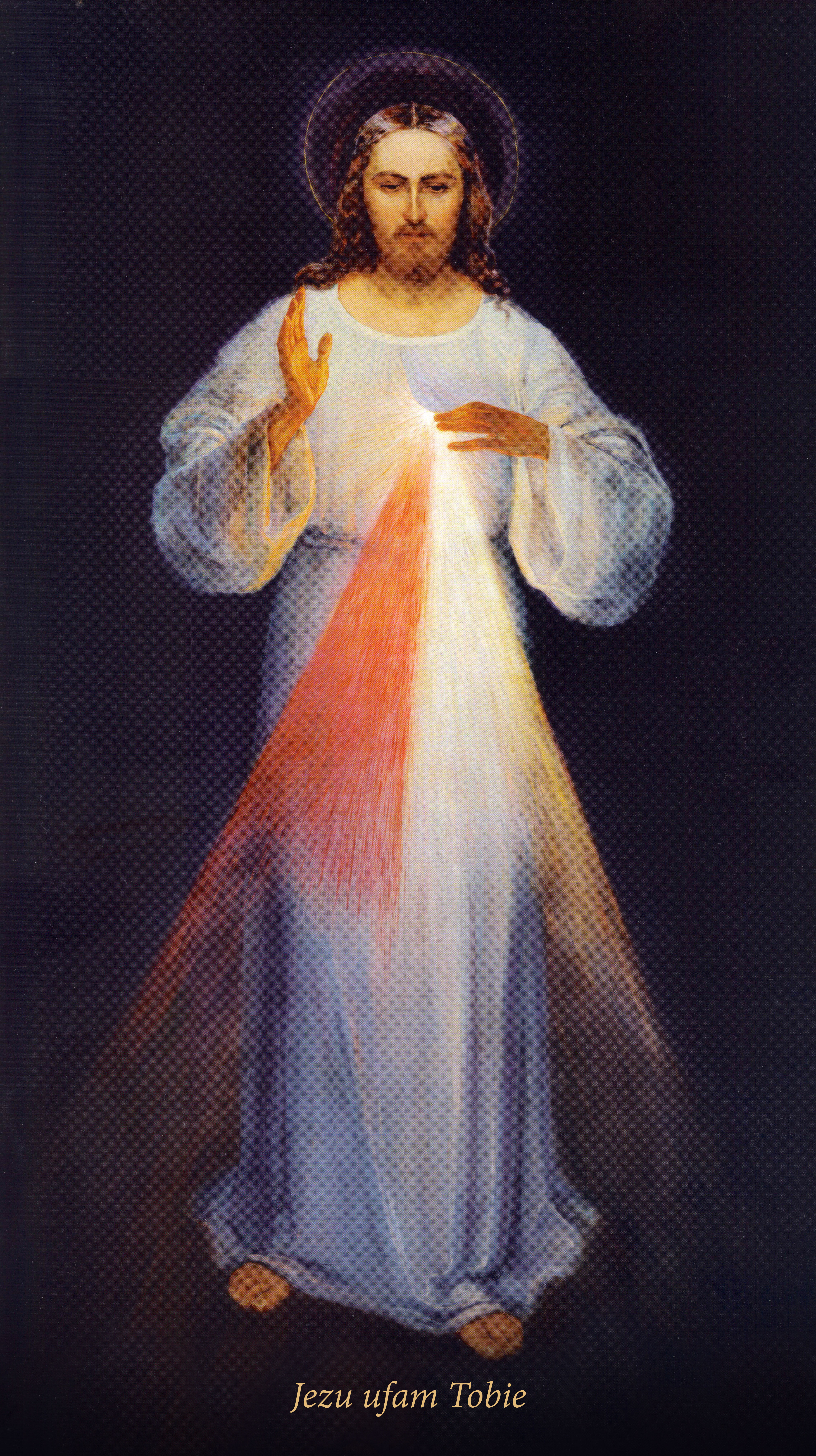 Eugeniusz Kazimirowski, Jezu ufam Tobie, 1934